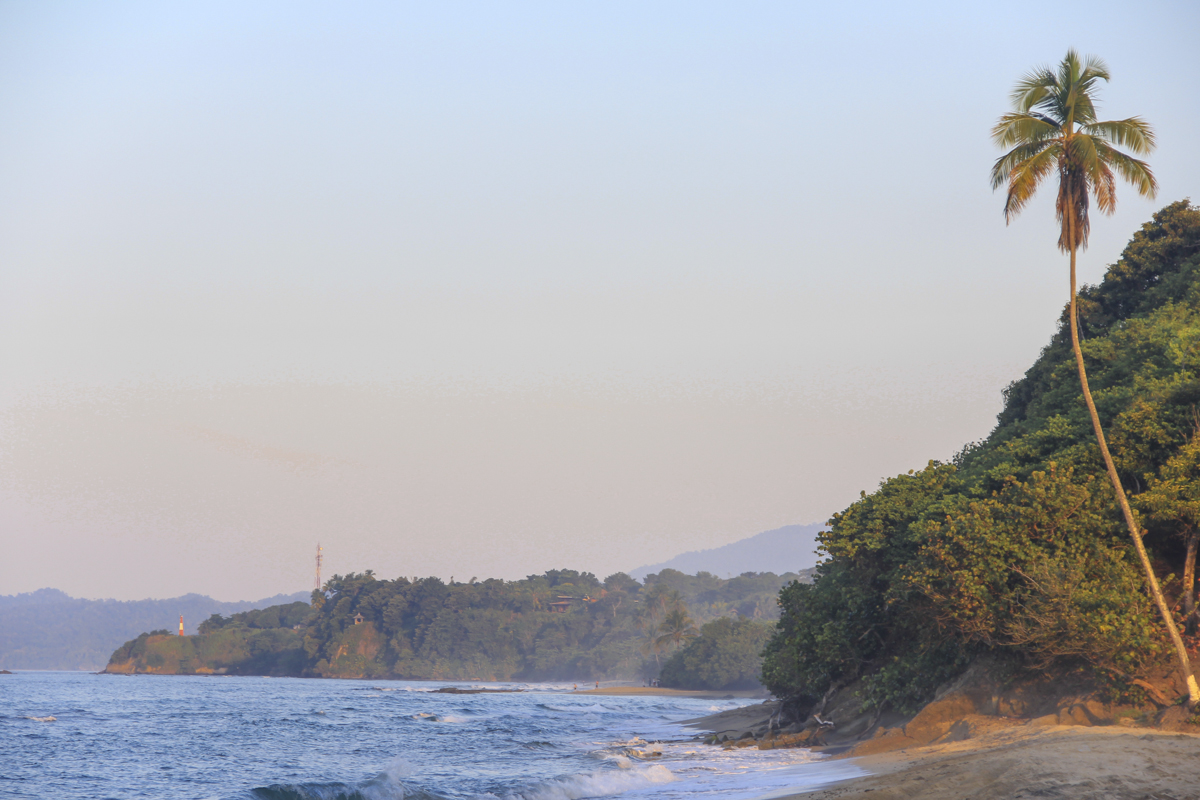 Playa Paraiso Costa de Miranda, Venezuela